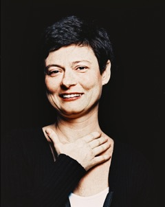 Porträt Maria Bettetini